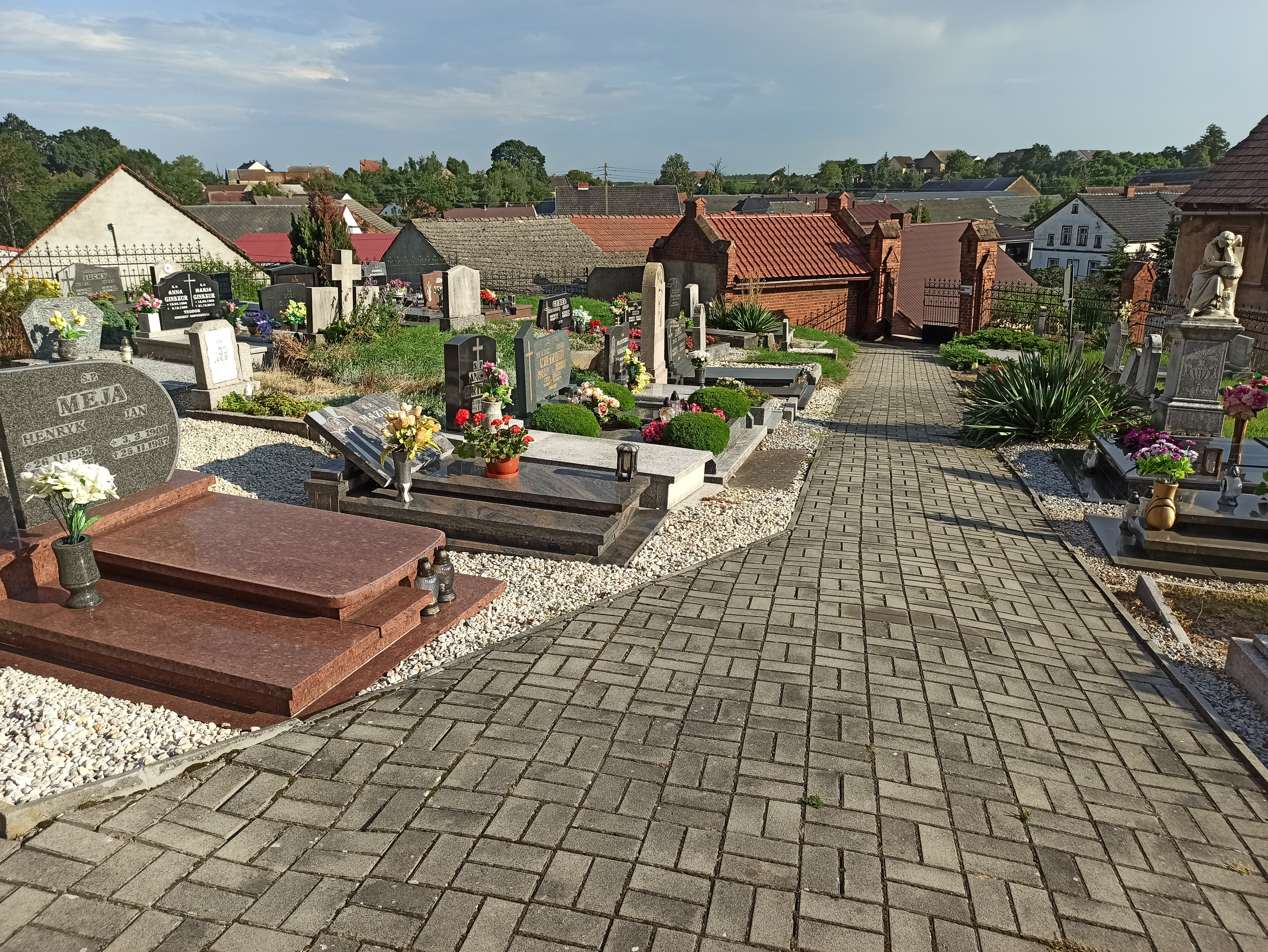 Prężyna, cmentarz.